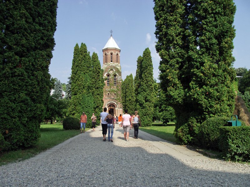 Palatul Episcopal din incinta Mănăstirii Curtea de Argeş